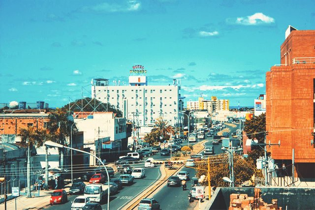 Zona para hacer compras en la ciudad.